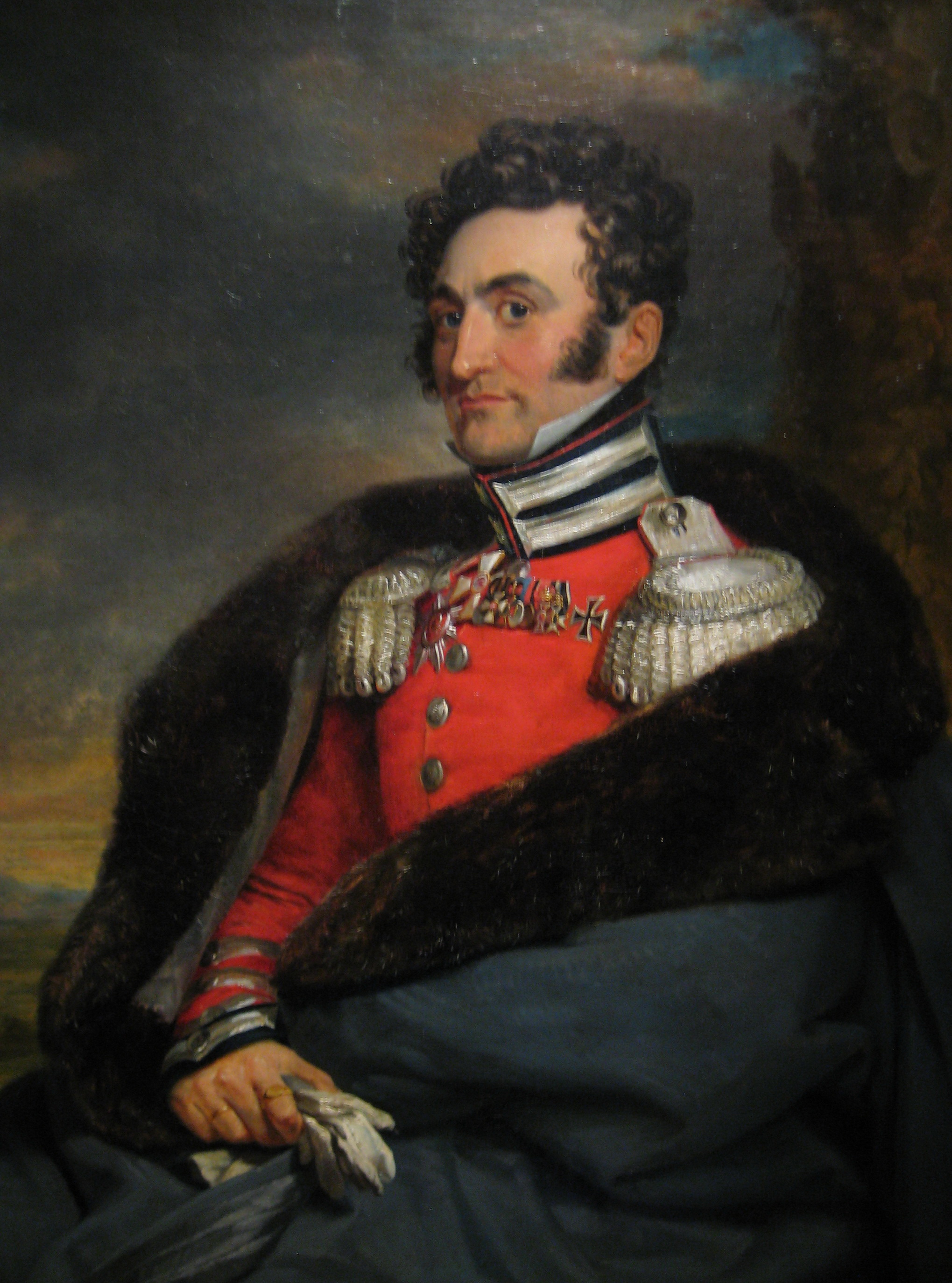 Выставка "Национальная портретная галерея", ГИМ, 2012